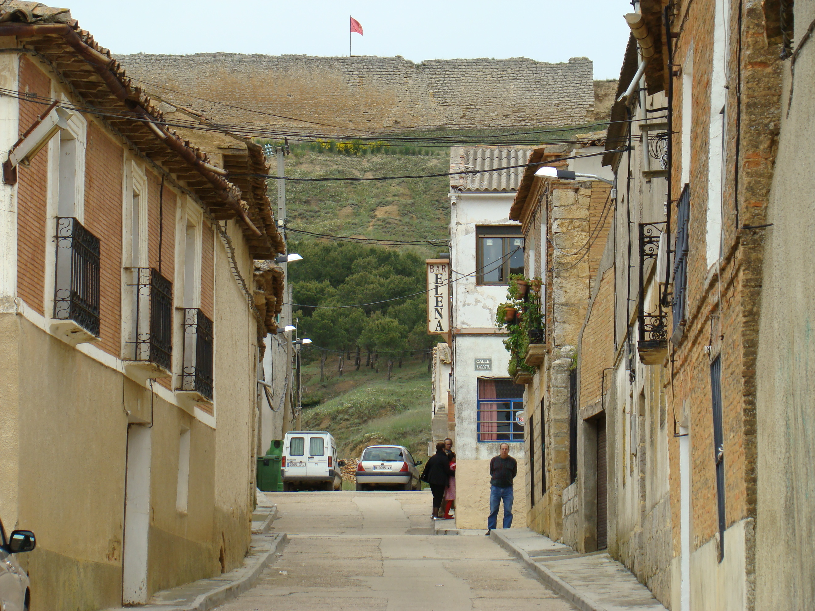 Una calle del municipio de Tordehumos (Valladolid, España). Al fondo se ven restos de una tapia que perteneció al castillo de defensa que se encontraba en todo lo alto.